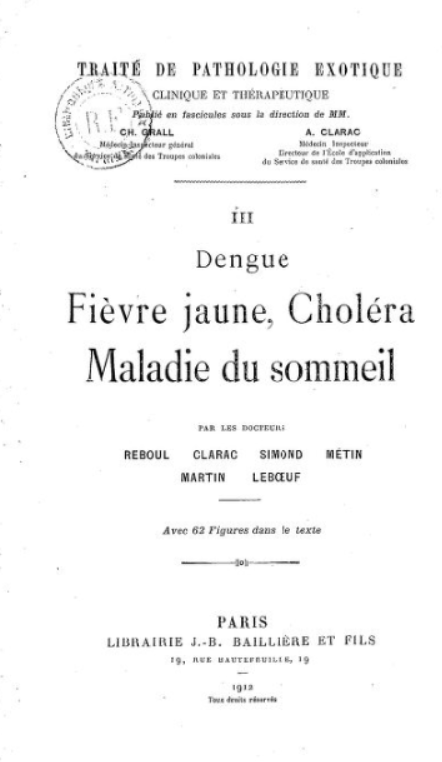 Page de couverture du 3e volume du Traité de pathologie exotique de Charles Grall et Albert Clarac